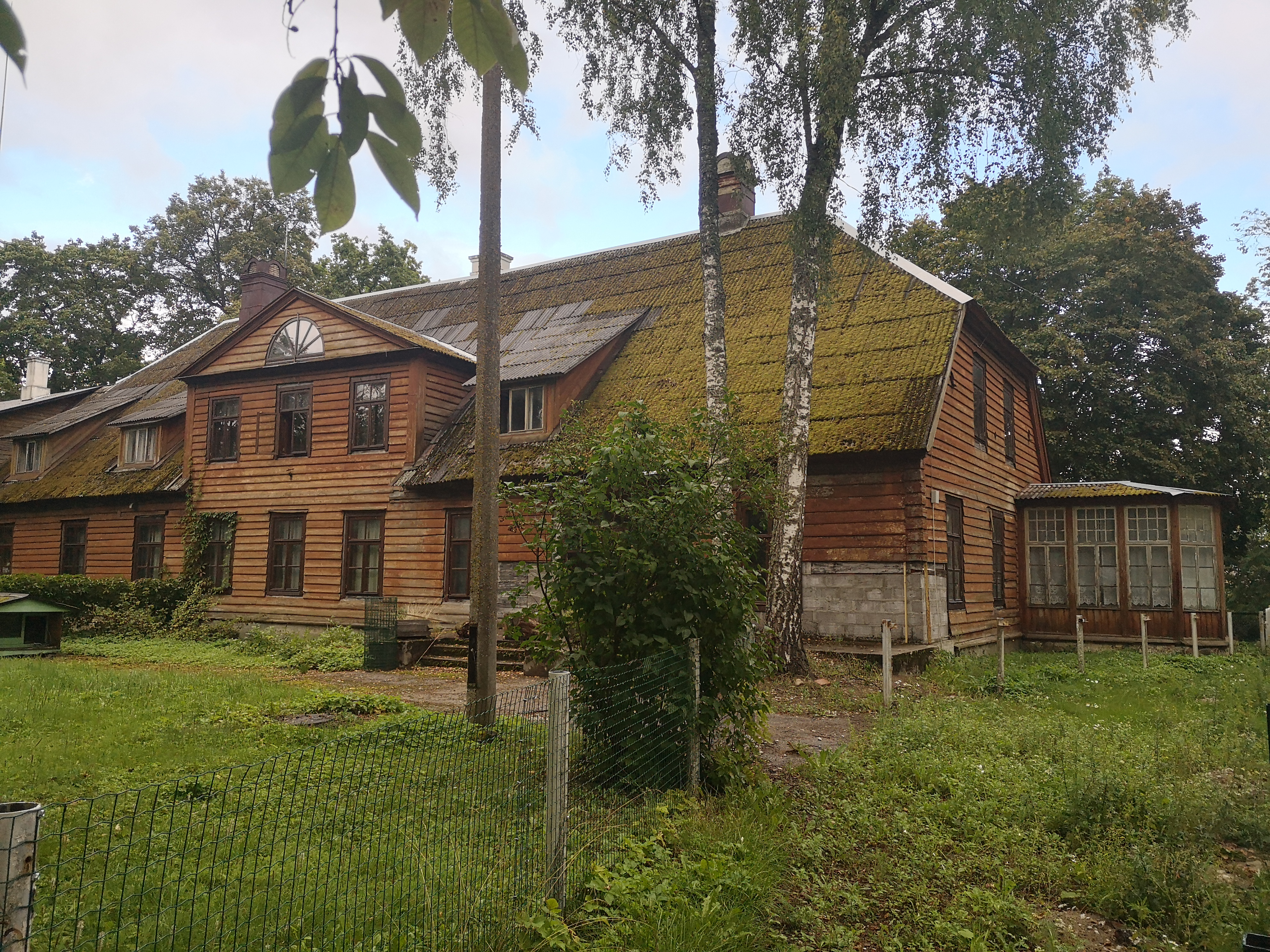 Kehra mõisa peahoone Kreutzwaldi tänaval